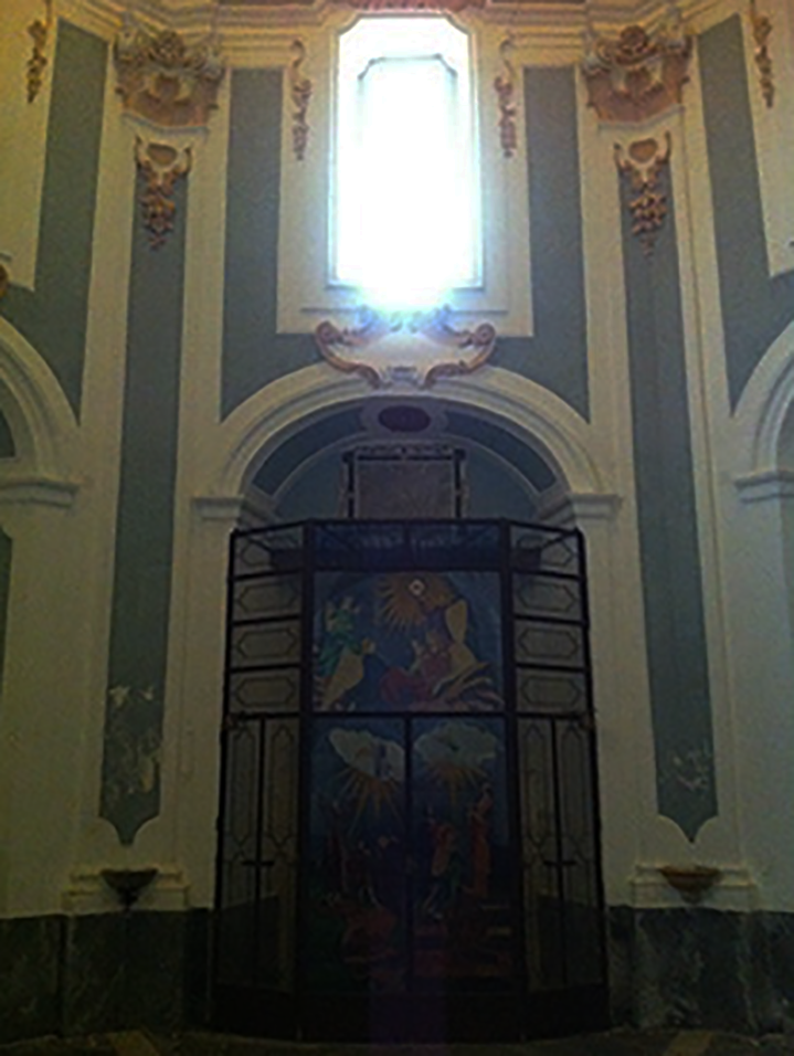 Ingresso Monte dei Morti di Salerno